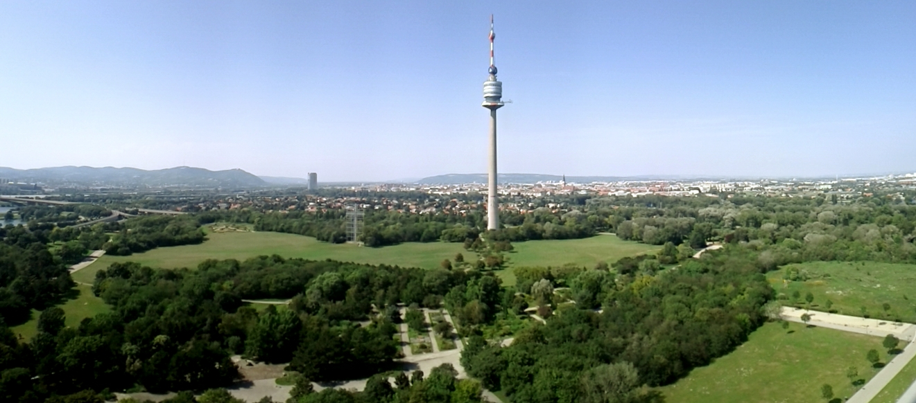 Donaupark Wien, Panoramaaufnahme